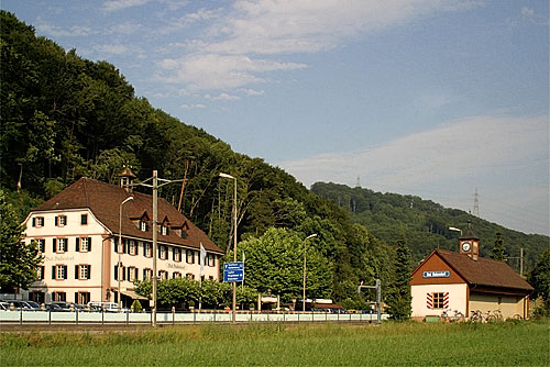 Bad Bubendorf: Historisches Hotel und Haltestelle der Waldenburgerbahn, 25. Juni 2003, Schweiz